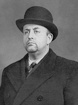 Eugène Deloncle Co-Founder Of La Cagoule in 1937.